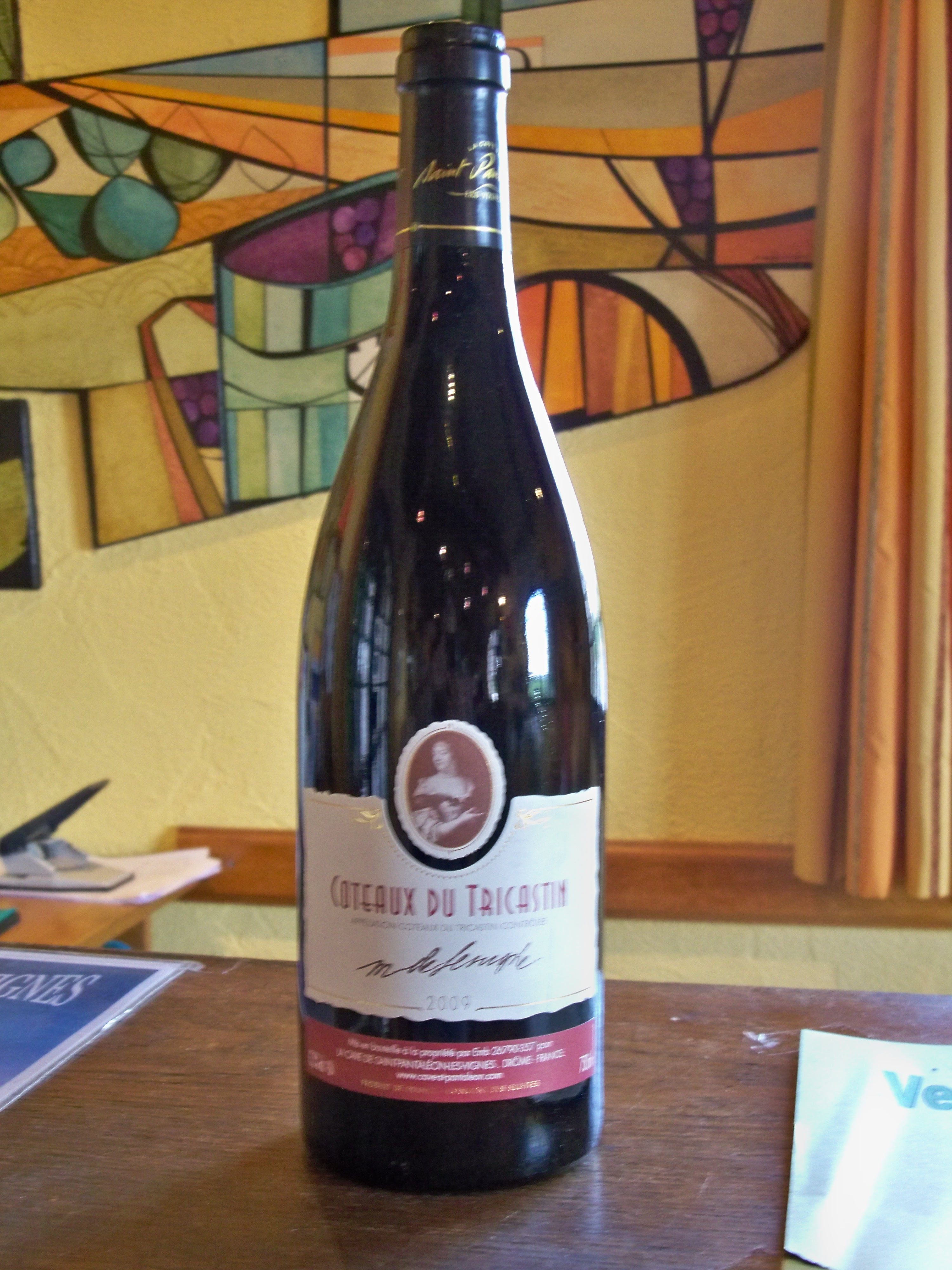 Bouteille de Côteaux du Tricastin